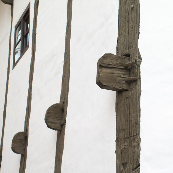 Konstruktionsdetail (Zapfenschloss) am Ständerbau in Quedlinburg